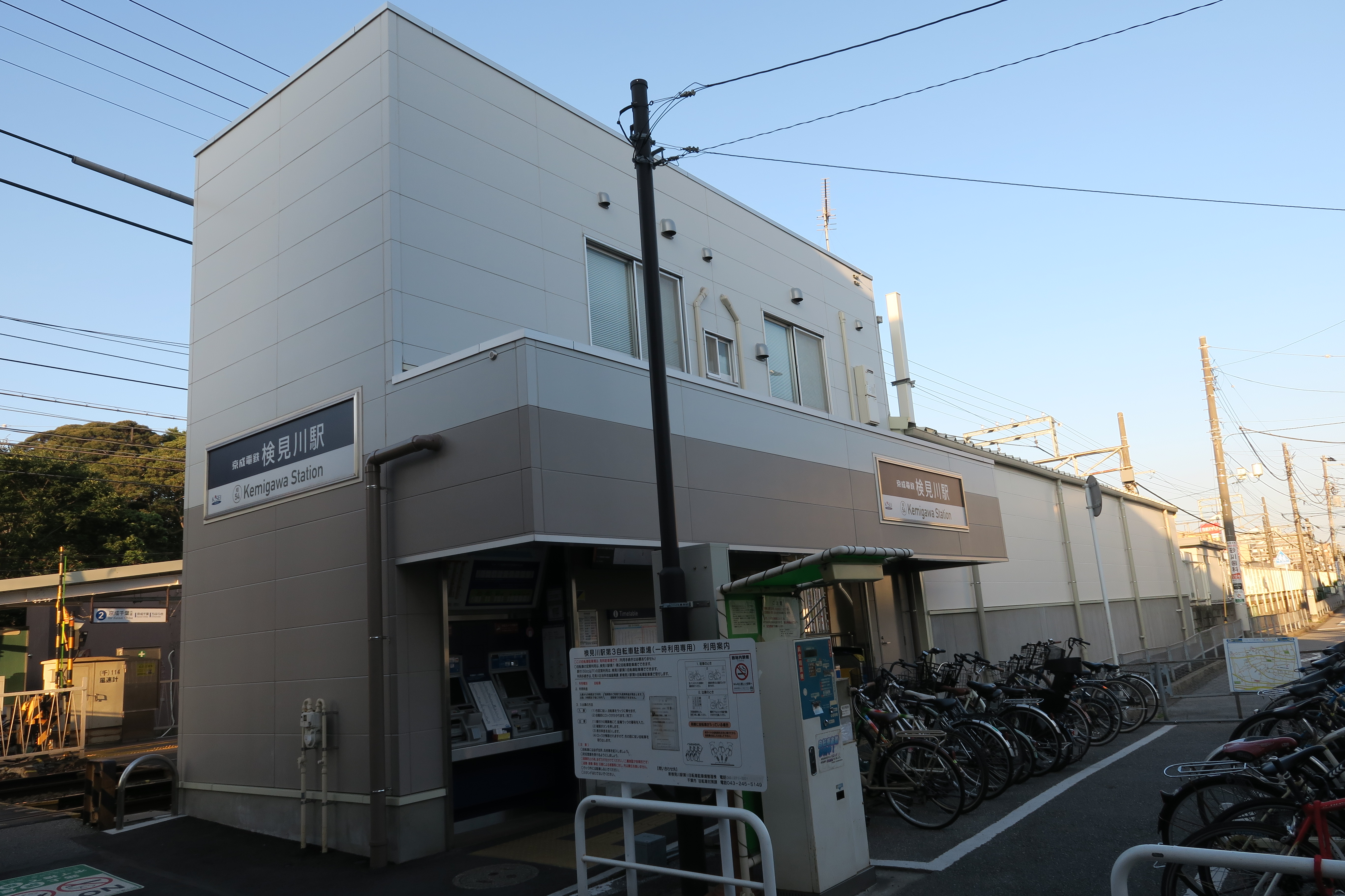 検見川駅新駅舎の写真。